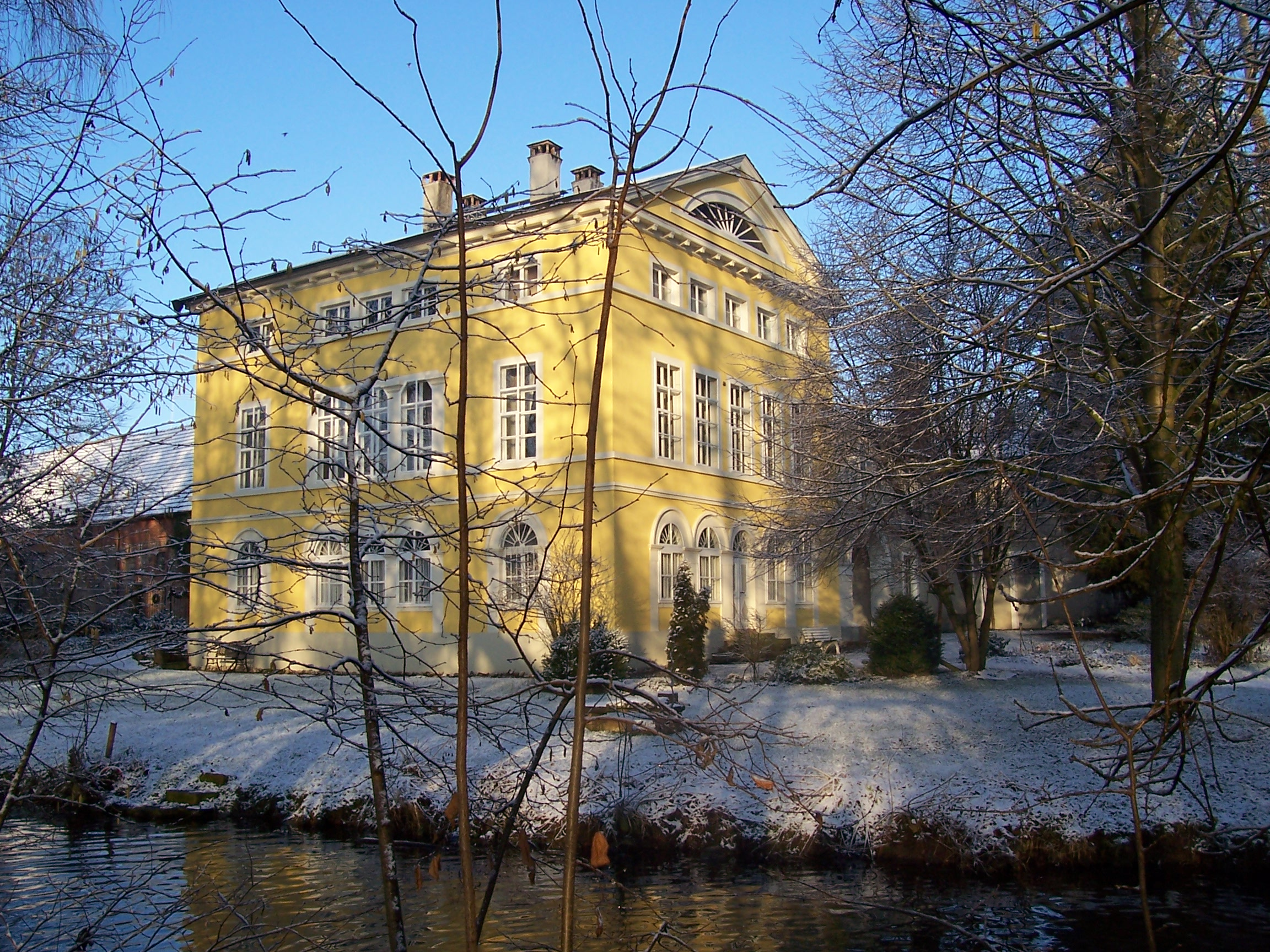 Schloss Uettingen Süd-Seite (Inhaber : Luitpold Graf Wolffskeel v. Reicheberg)